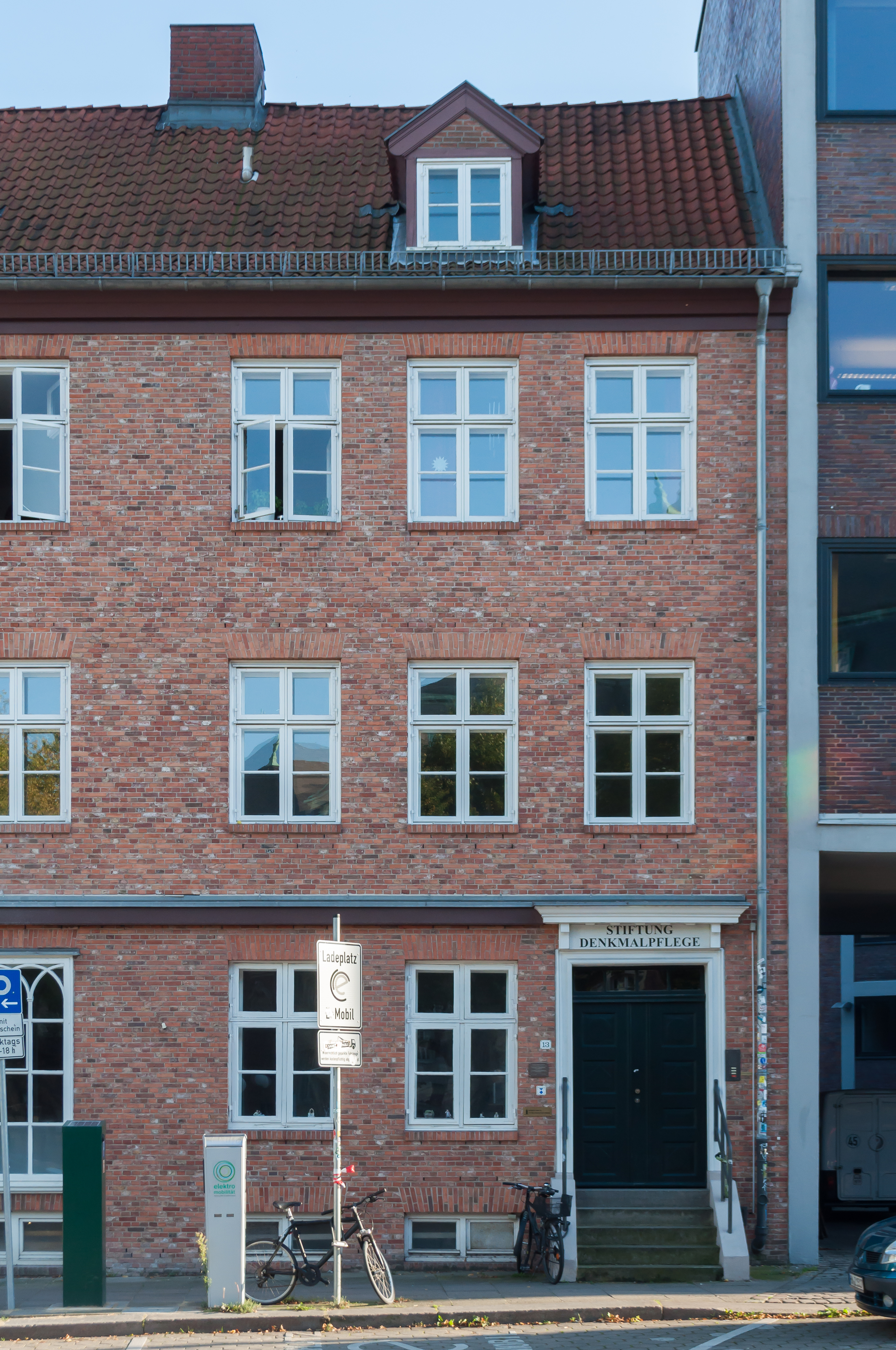 Wohnhaus Dragonerstall 13 in Hamburg-Neustadt. This is a photograph of an architectural monument.